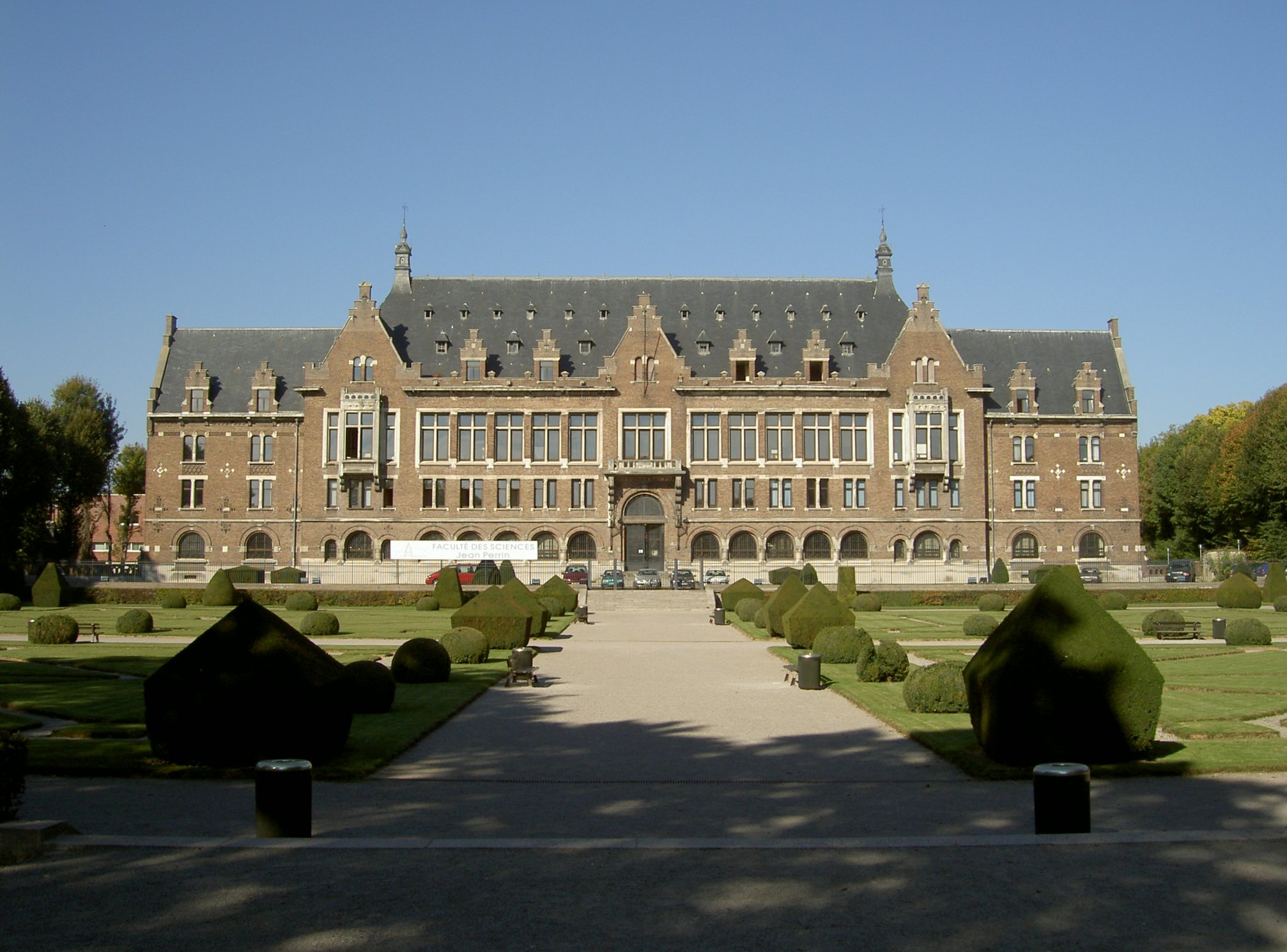 Grand Bureaux de la Compagnie des mines de Lens, actuelle Faculté des sciences Jean Perrin (Université d'Artois), Lens, Pas-de-Calais, Nord-Pas-de-Calais, France.